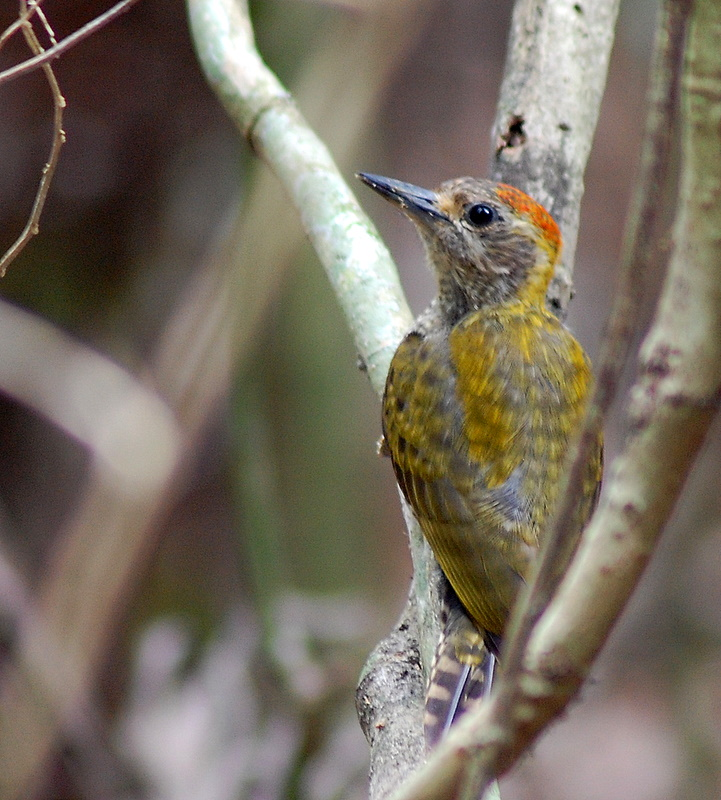 A male Veniliornis maculifrons in Vila do Abraão, Ilha Grande, Rio de Janeiro, Brazil.